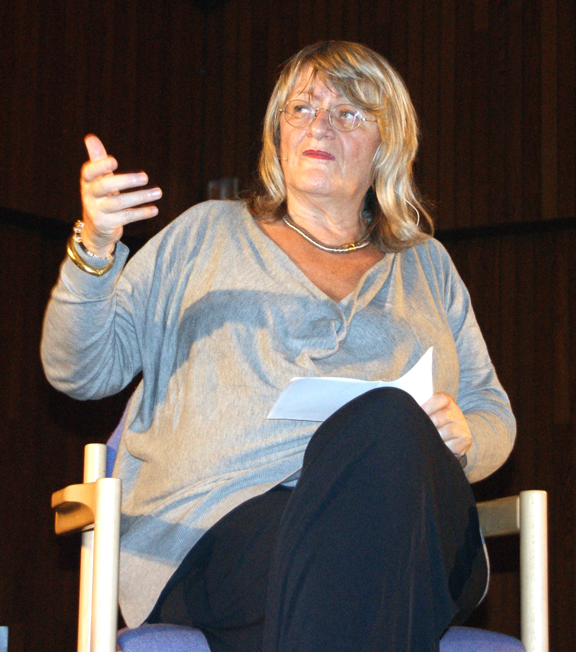 Alice Schwarzer, visit at the CJD Christophorusschule Königswinter